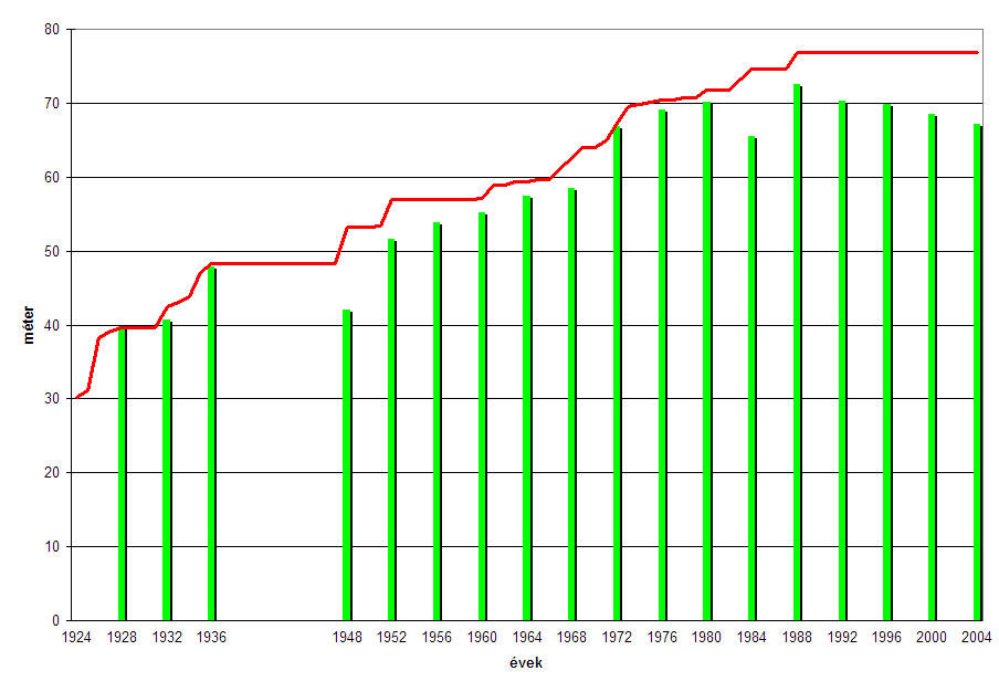 A női diszkoszvetés olimpiai bajnokainak eredményei olimpiánként (zöld oszlopok) és a világrekord változása (piros vonal)